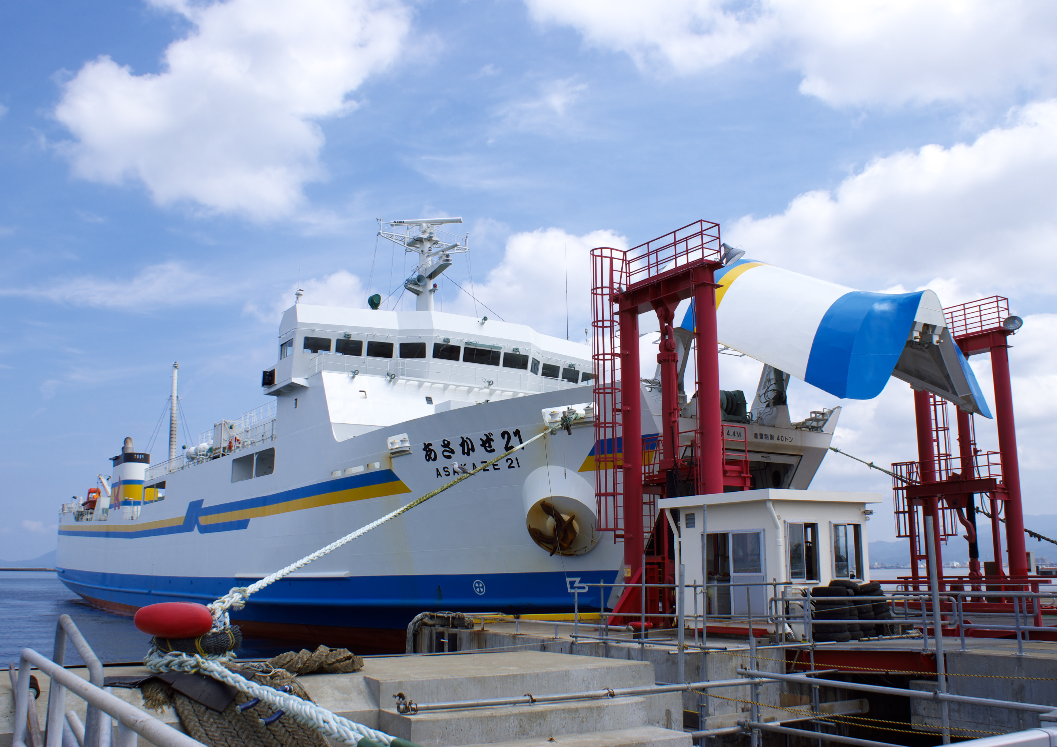 青森港フェリーターミナルに接岸中の青函フェリー「あさかぜ21」、2009年8月15日撮影。